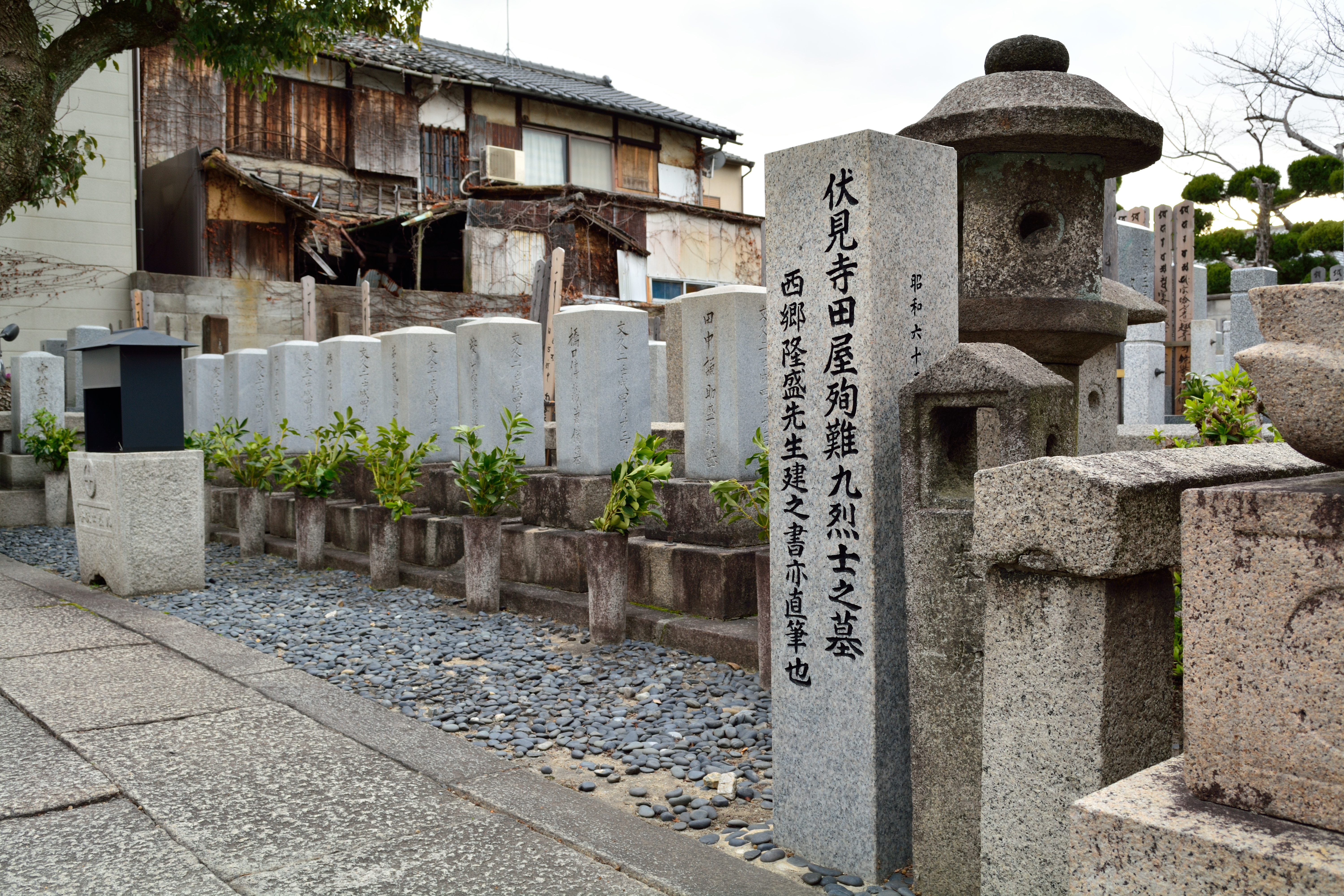 大黒寺薩摩藩勤王党有馬新七ら伏見寺田屋殉難九烈士之墓、墓石の揮毫は西郷隆盛